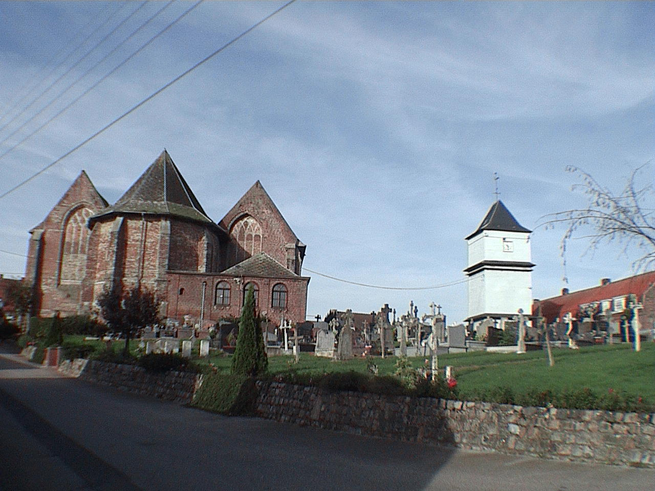 Eecke (Canton de Steenvoorde) l'église et le klokhuis